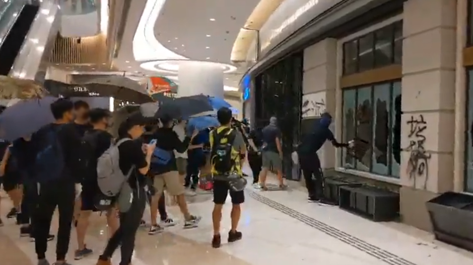 Popcorn 商場有市民於廣場位置叫喊口號、唱《願榮光歸香港》。後來有示威者破壞商場內屬於美心集團旗的食肆 Simply Life